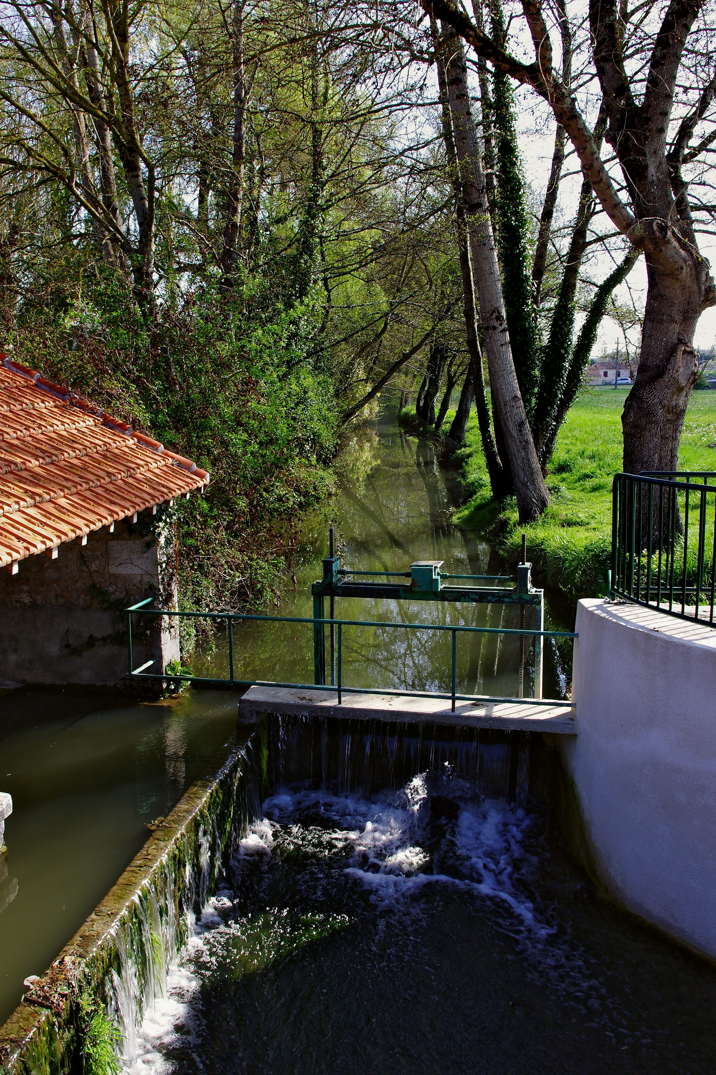 Blanzac_Né_Rices1_2012.jpg Le Né vu du pont des Rices à Blanzac, Charente, France.